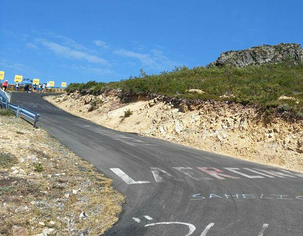 Subida al puerto de La Campeona, en Sabero (España)